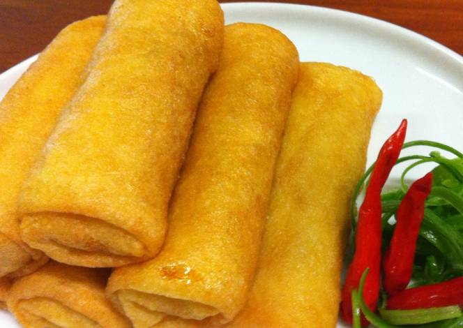 Sosis solo goreng